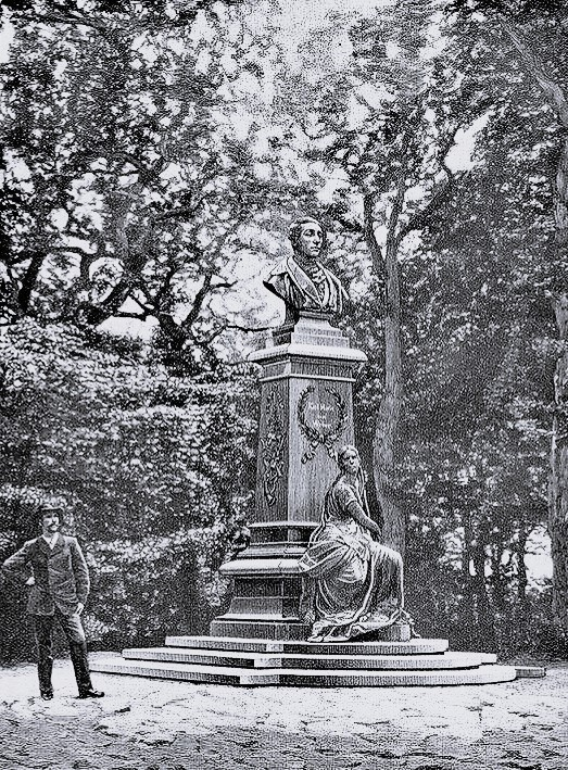 Das Denkmal Karl Maria v. Weber’s in Eutin. Nach einer Photographie von Albert Giesler.